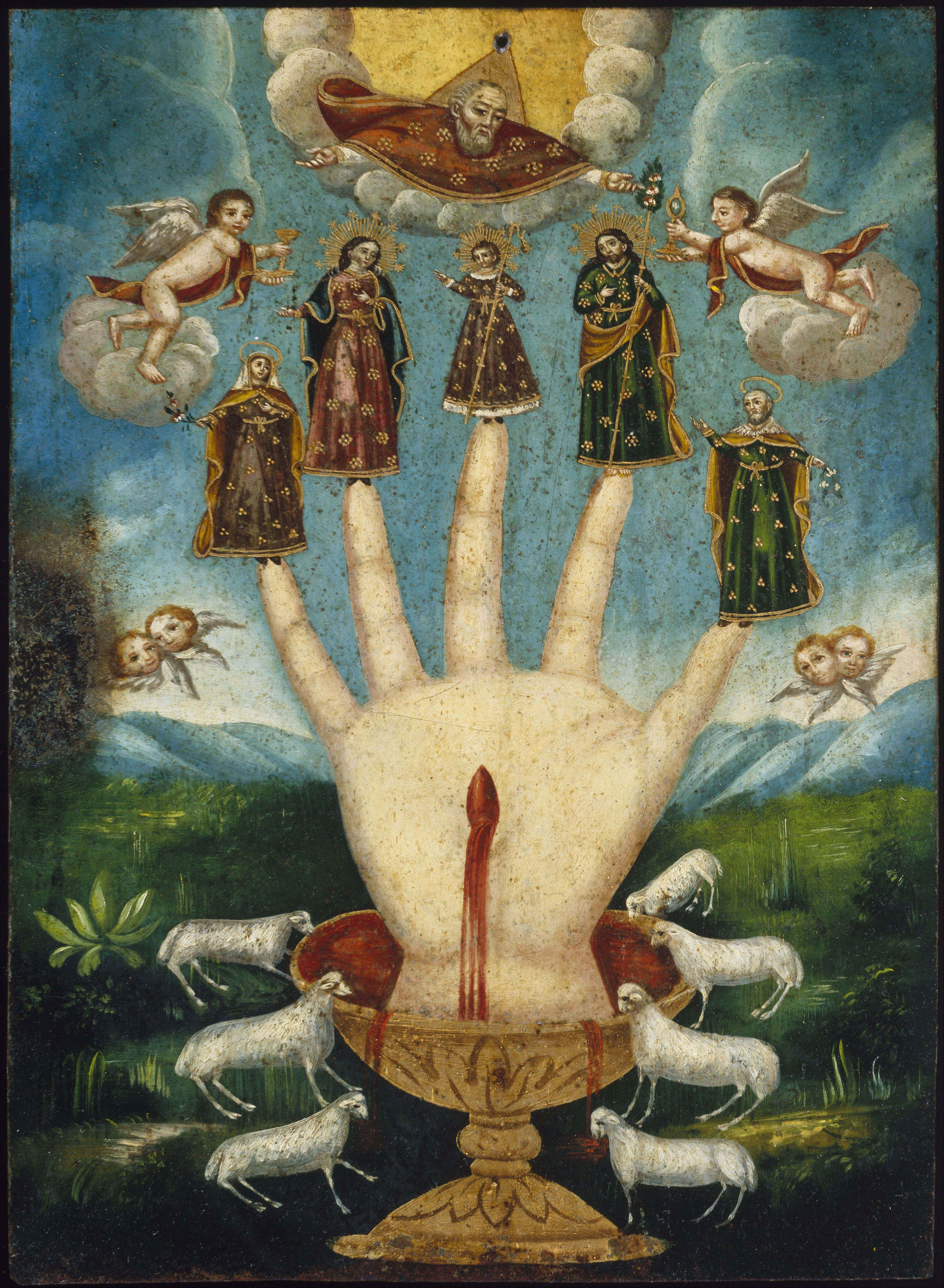 Символічний релігійний живопис Мексики 19 ст. («Всемогутня рука християнського Бога»)